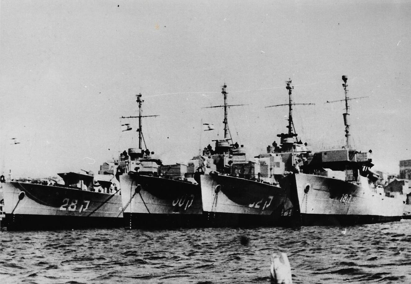 שלושת הפריגטות והקורבטה ק-18 בעת עגינה בפיראוס